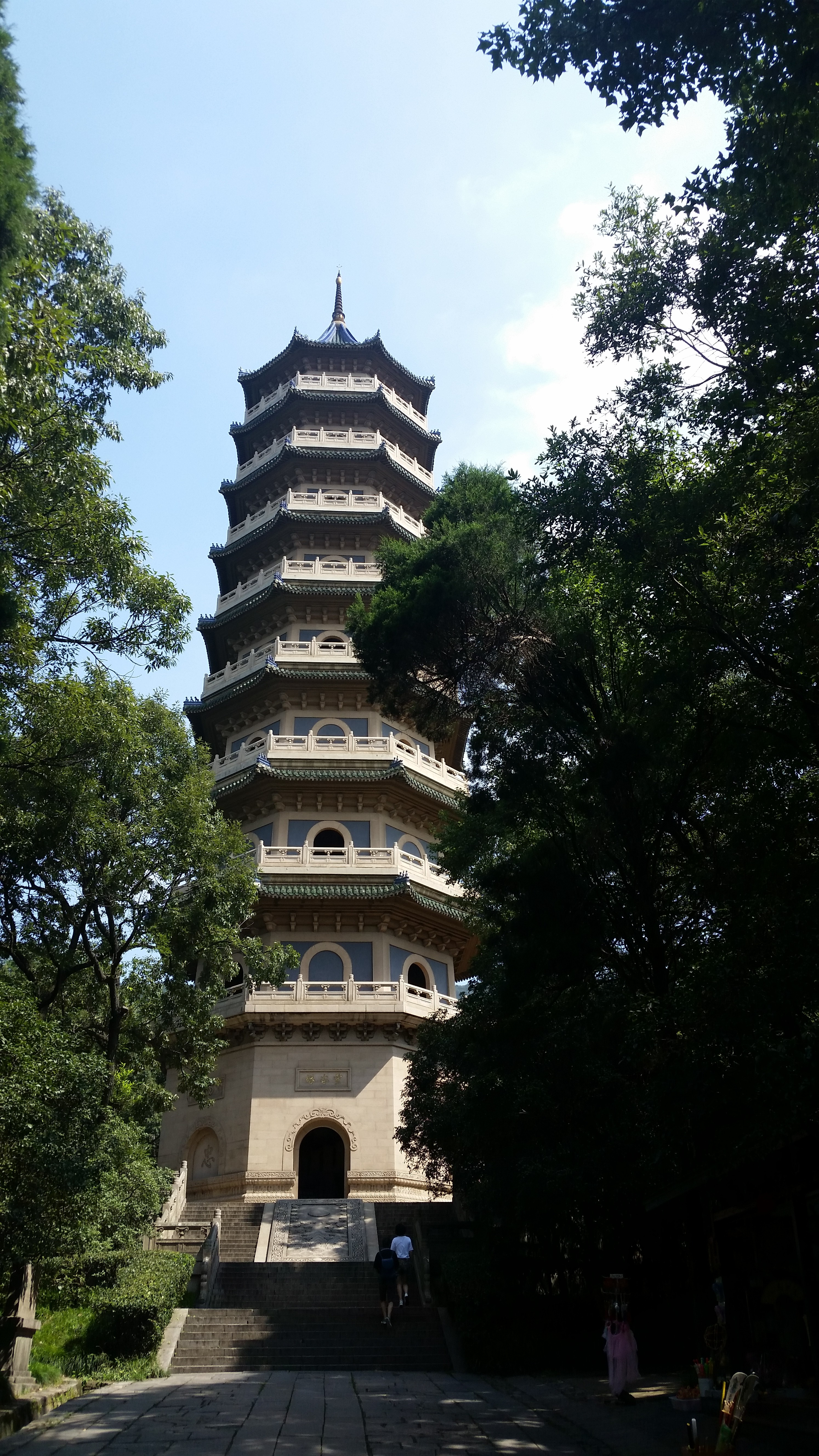 南京灵谷塔